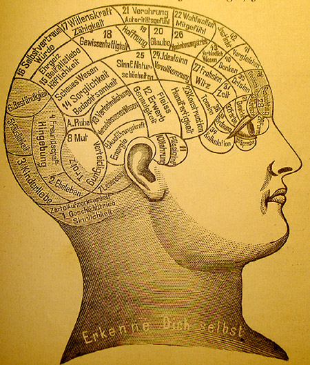 Phrenologie